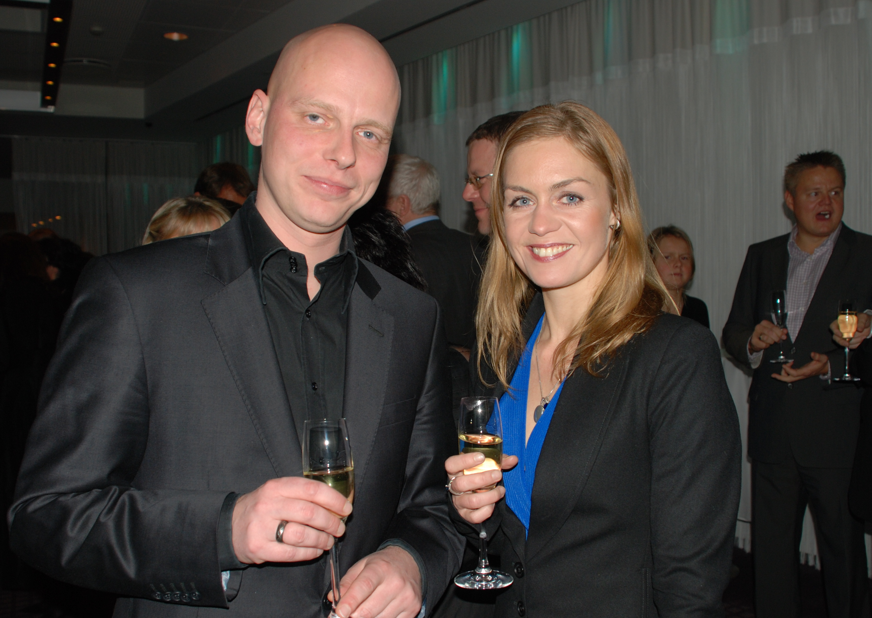 Ragnar Bragason á Edduverðlaununum árið 2007